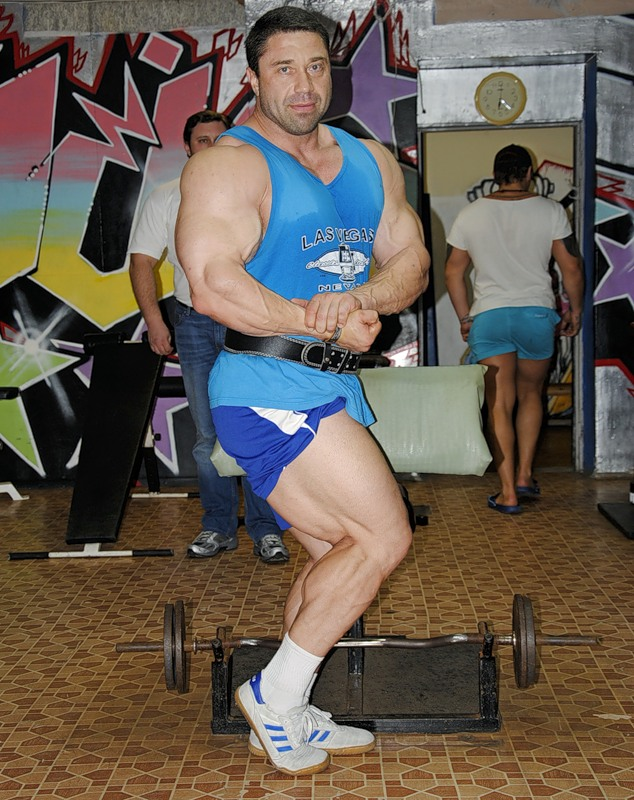 Российский культурист